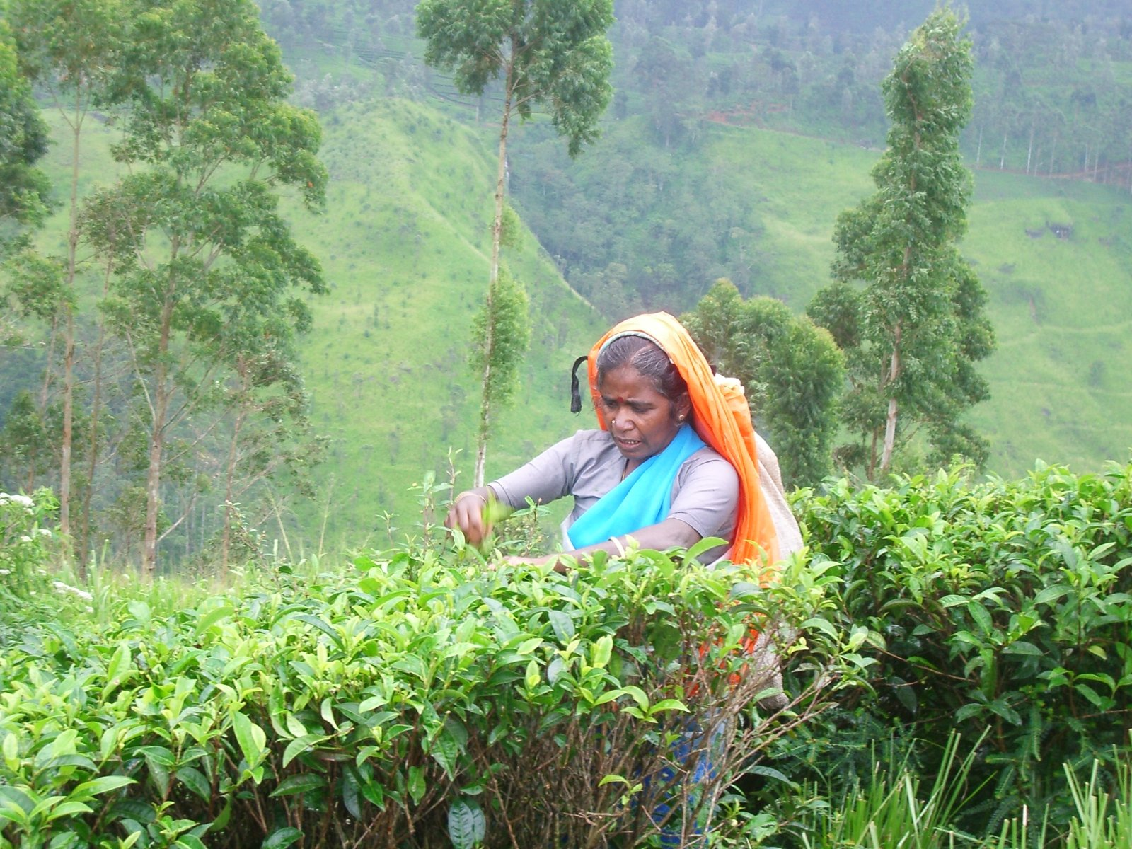 Dones tamil recolectora de te a la provincia Central de Sri Lanka, foto feta per J. Ollé el juliol del 2006